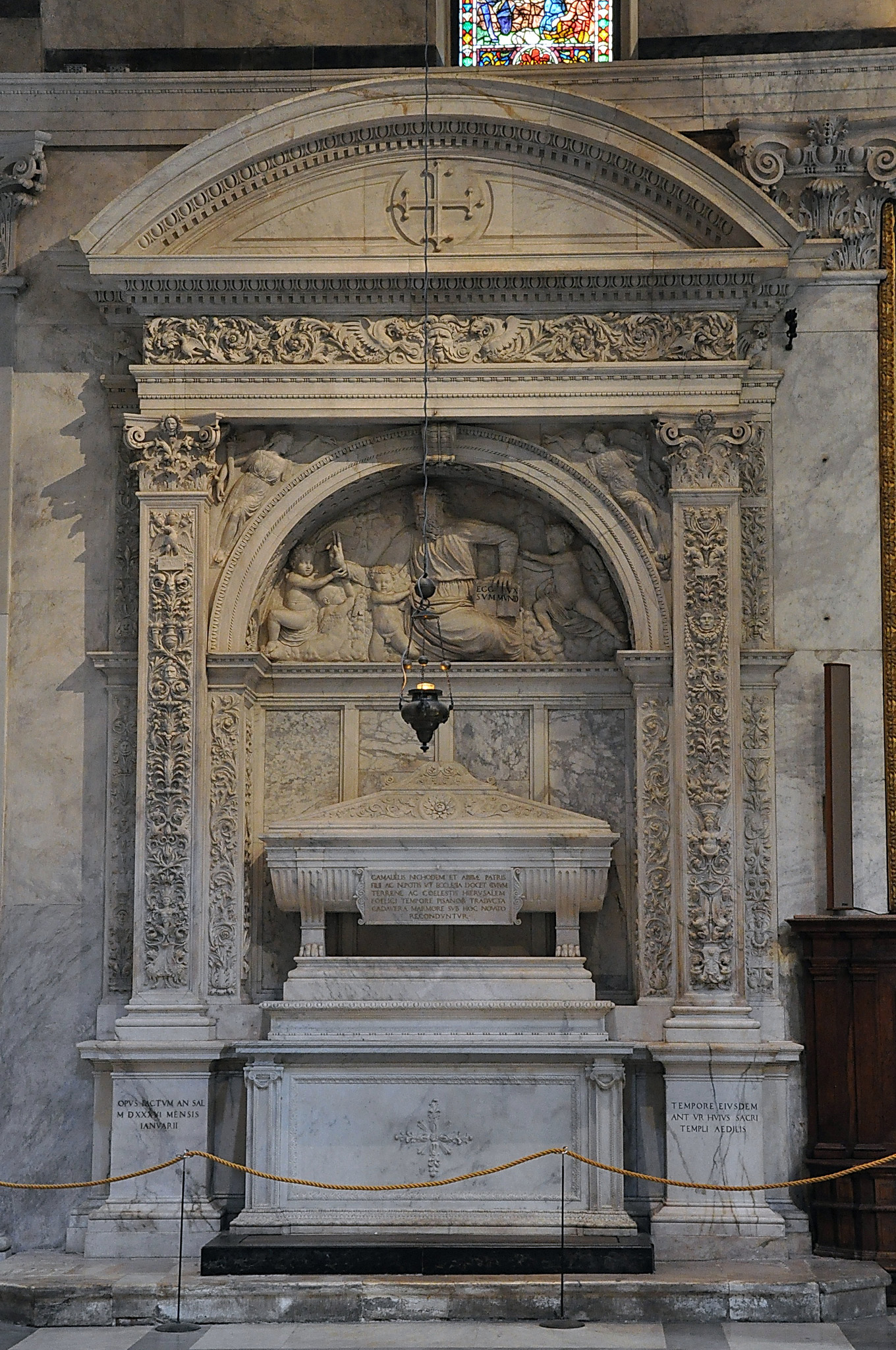 Tomba dei Santi Abibo, Nicodemo e Gamaliele (1536). Si trova nel Duomo di Pisa.